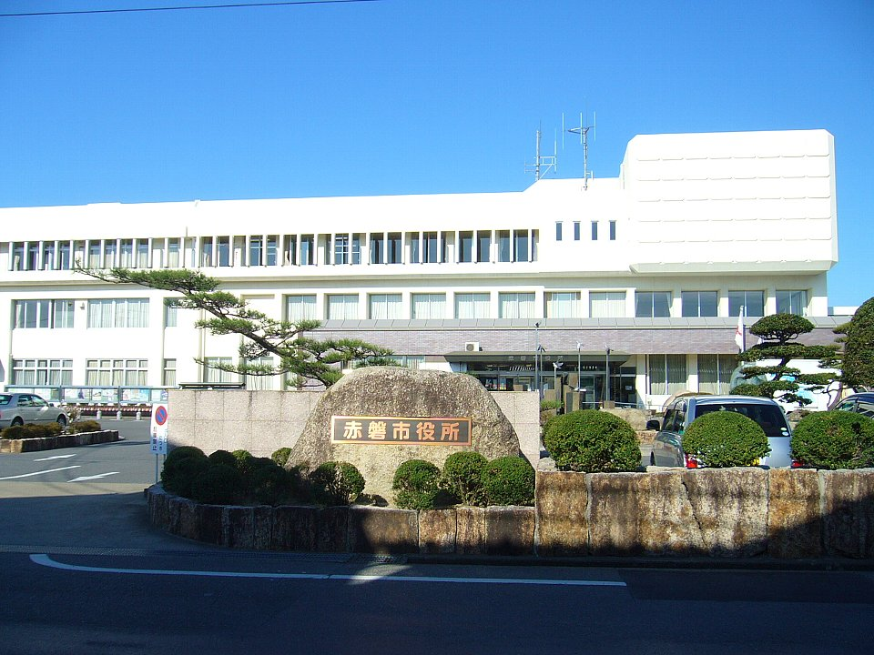 赤磐市役所（旧・山陽町役場）